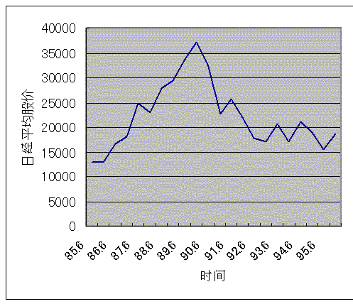 自己制作。。